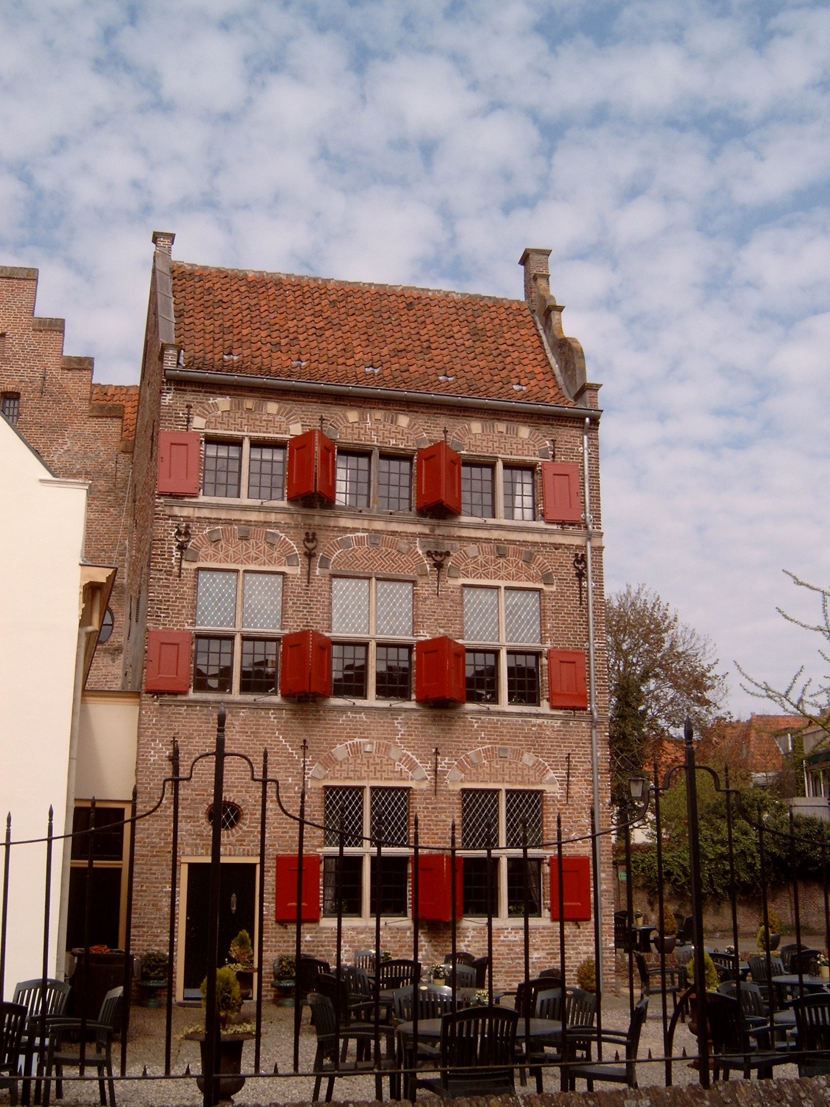 Hattem, monumentaal pand